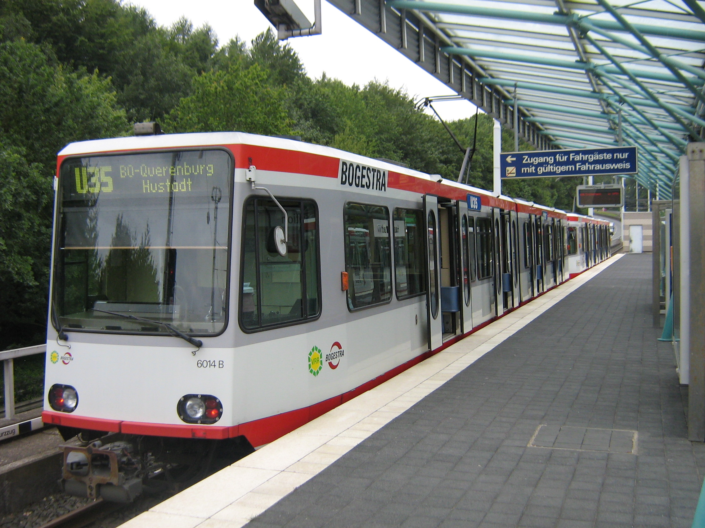 B-Wagen der Bogestra auf der Linie U35 in Bochum